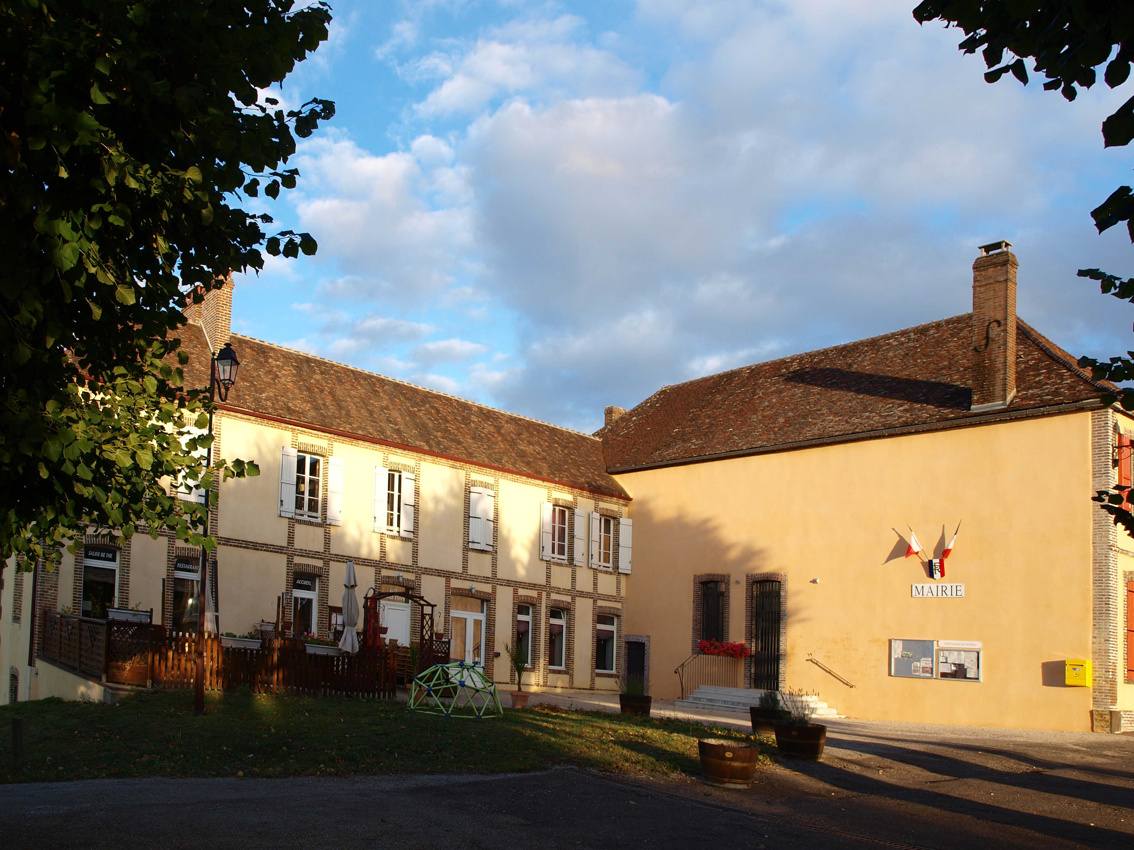 Merry-la-Vallée (Yonne, France) ; la mairie & le restaurant.